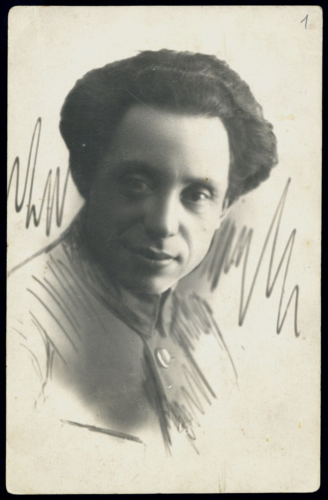 Змітрок Бядуля